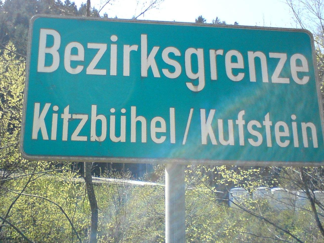 Bezirksgrenze, B178